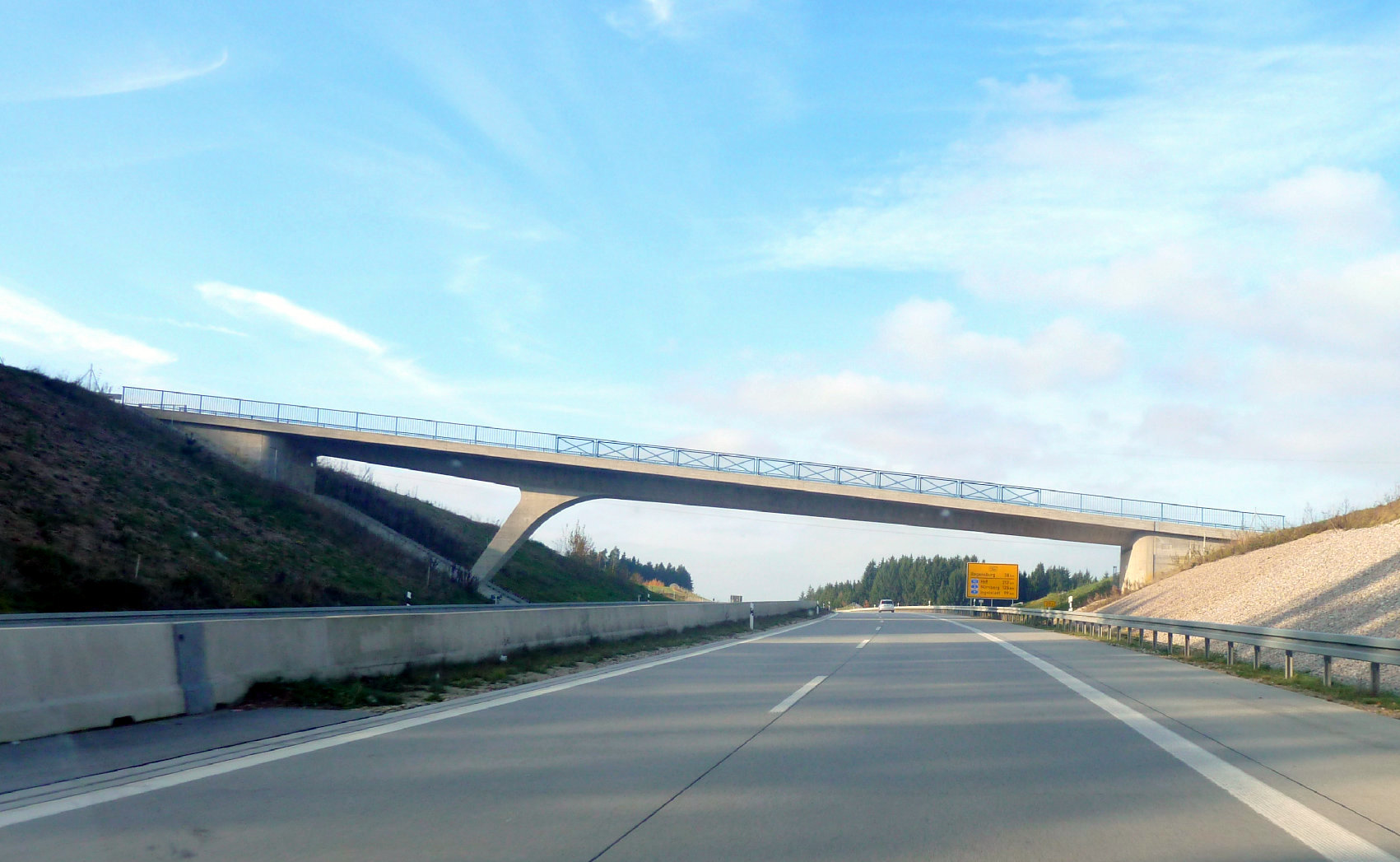 B15 neu in Fahrtrichtung Regensburg - Brücke zwischen Hofendorf und Winkelsaß